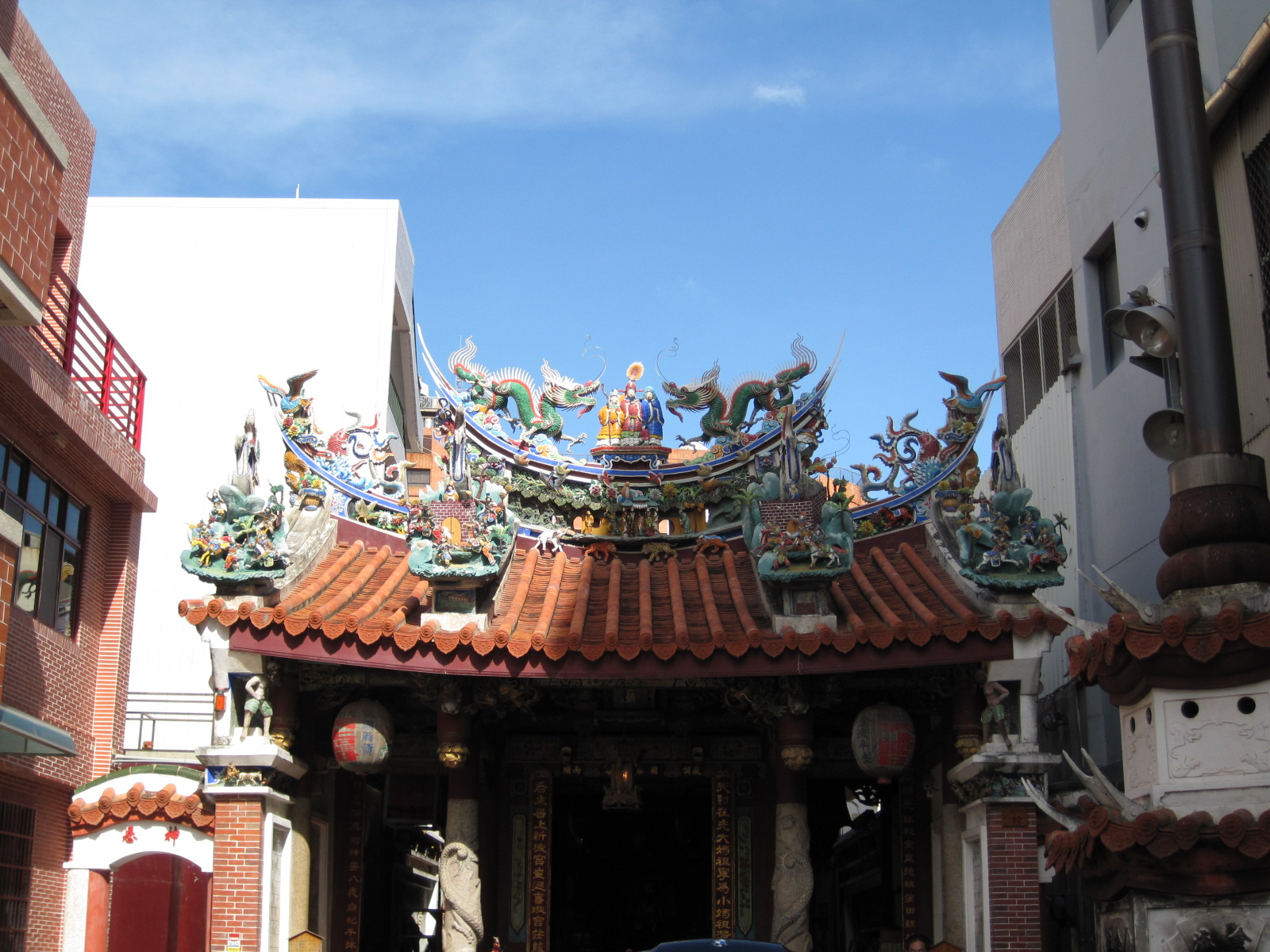 臺南開基天后宮